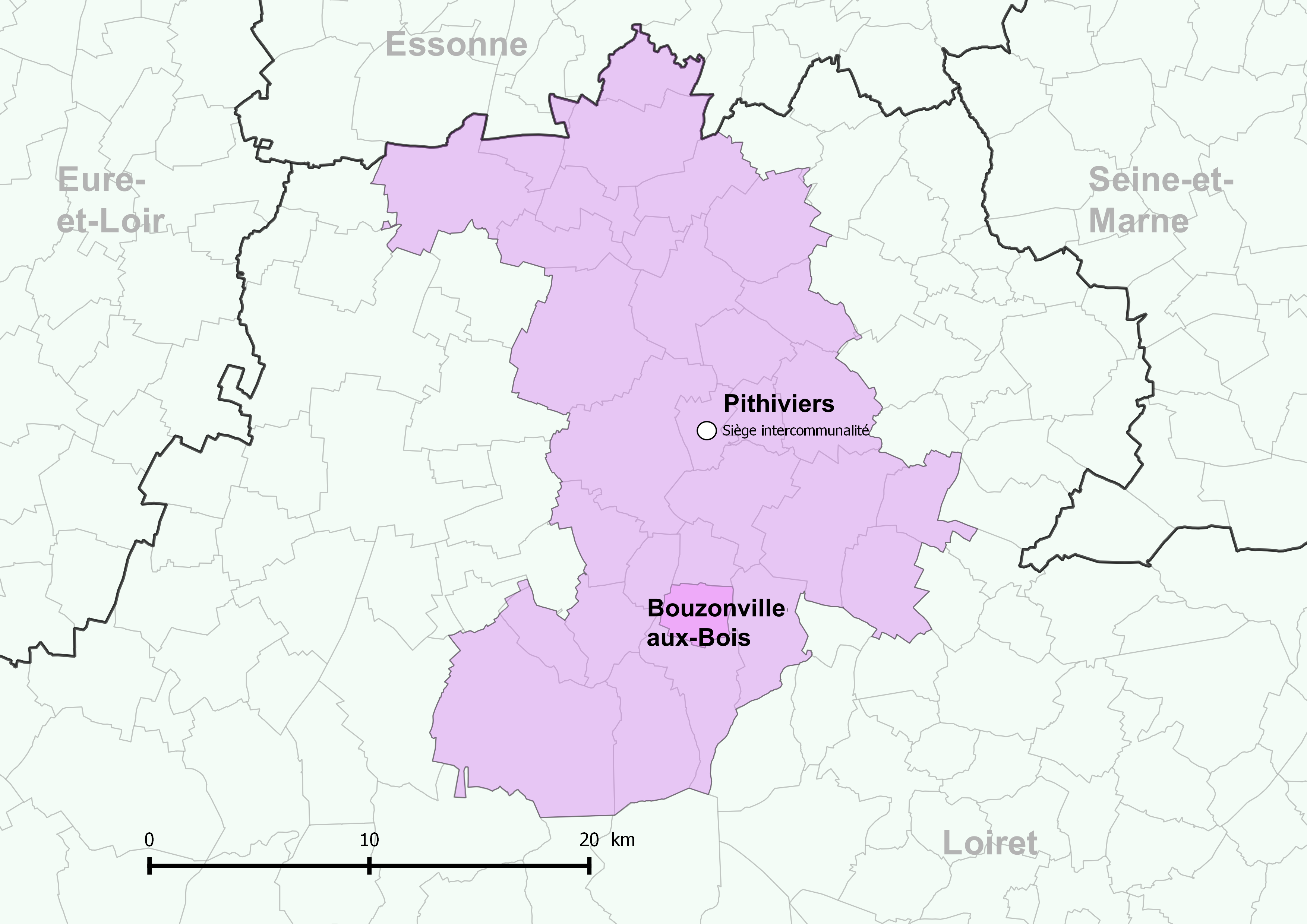 Périmètre de la communauté de communes du Pithiverais - Positionnement de la commune de Bouzonville-aux-Bois.